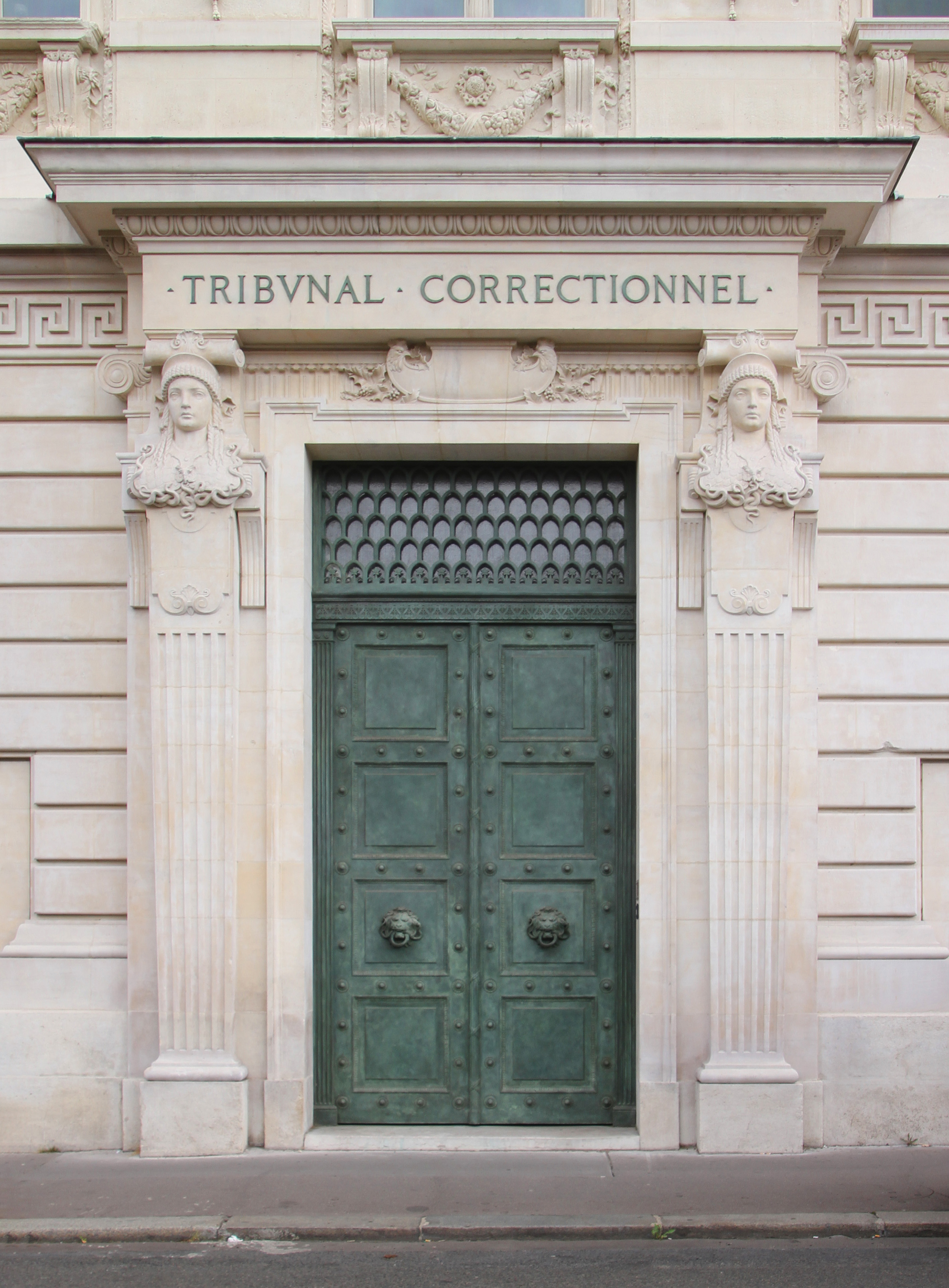 Tribunal correctionnel in Paris